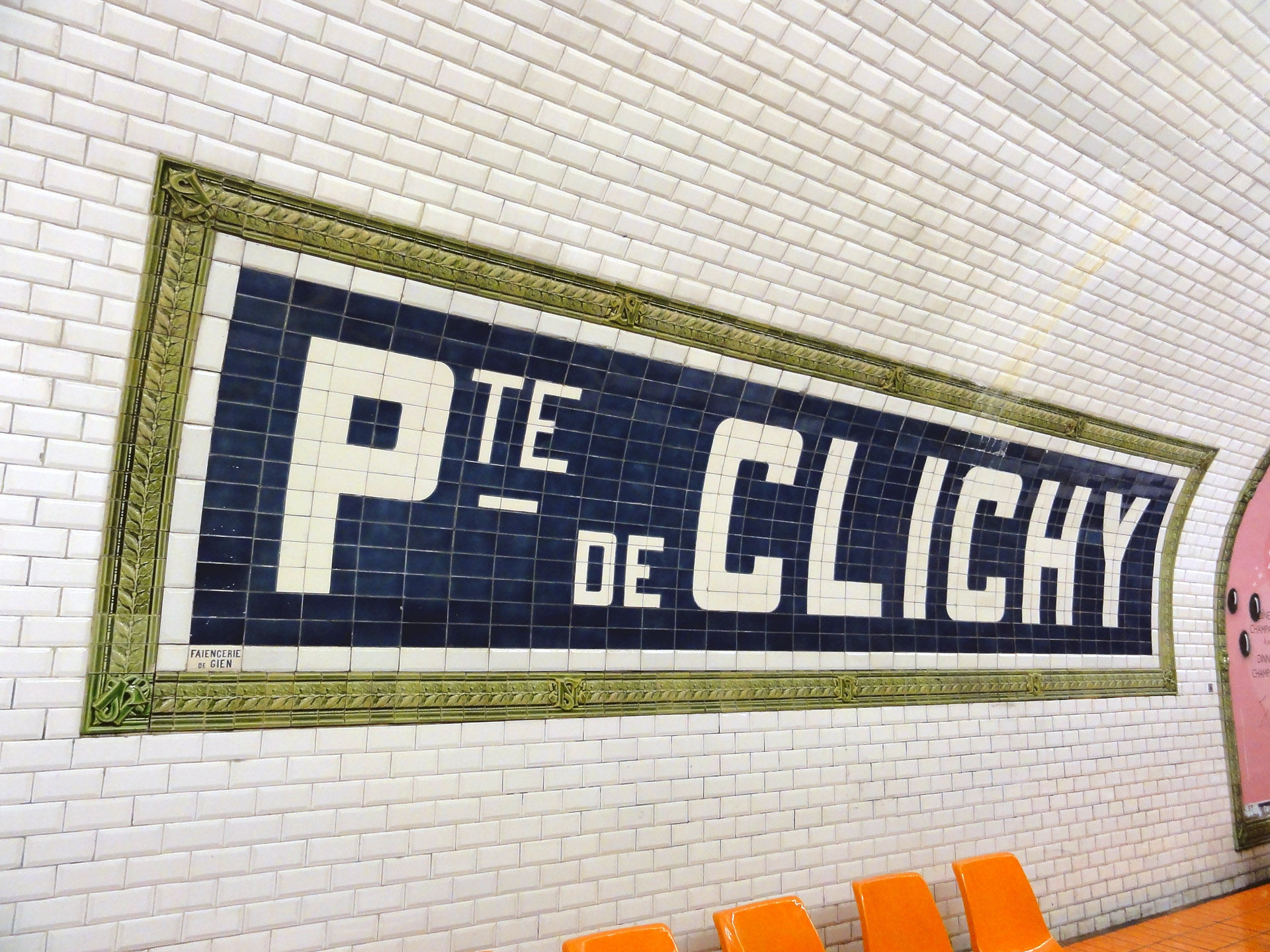 La station Porte de Clichy de la ligne 13 du métro de Paris, France